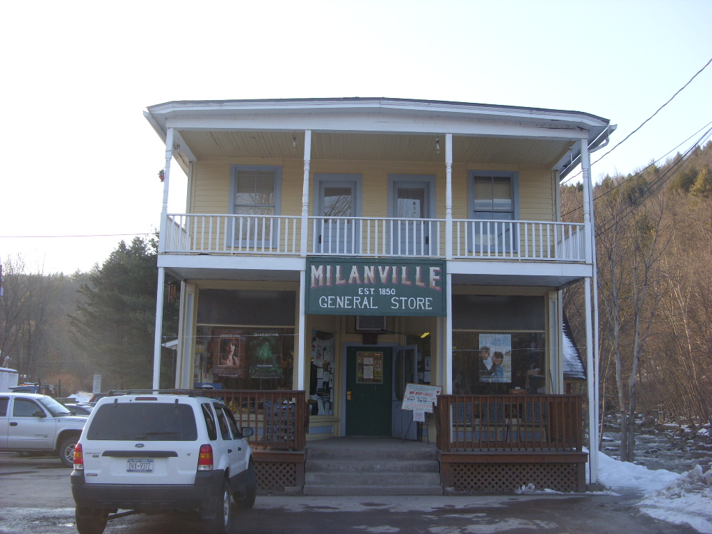 Milanville, Pennsylvania